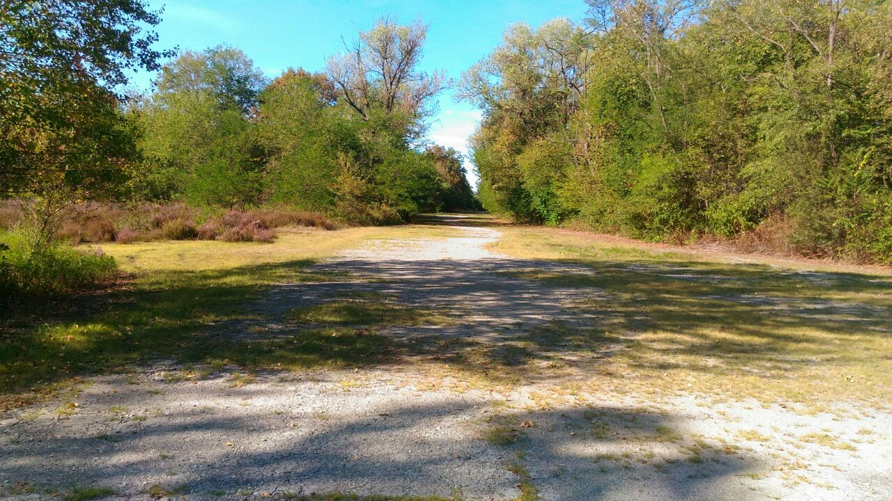 Pista di decentramento nella zona di via Gaggio a Lonate Pozzolo.